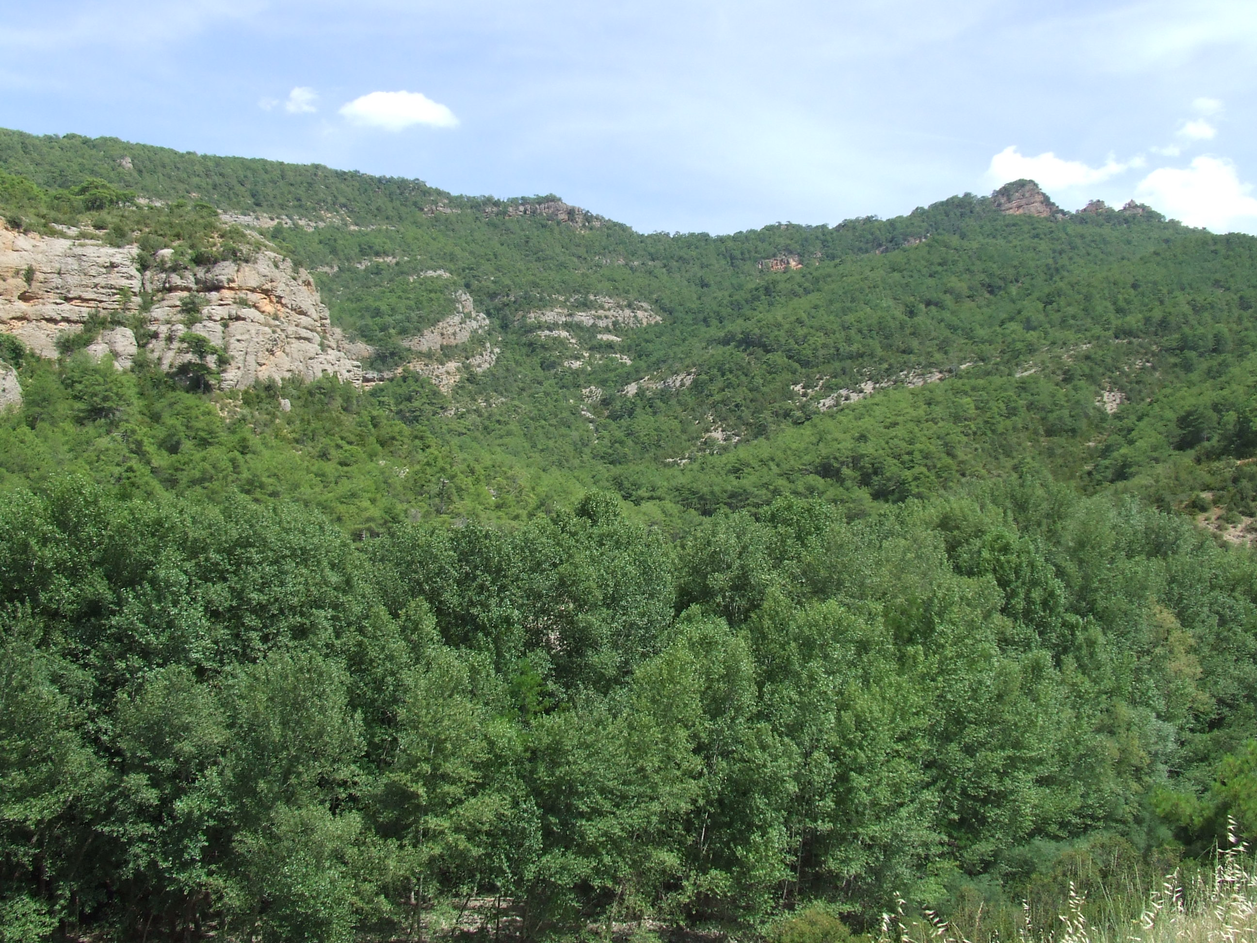 Llania (Hortoneda de la Conca, Conca de Dalt, Pallars Jussà)